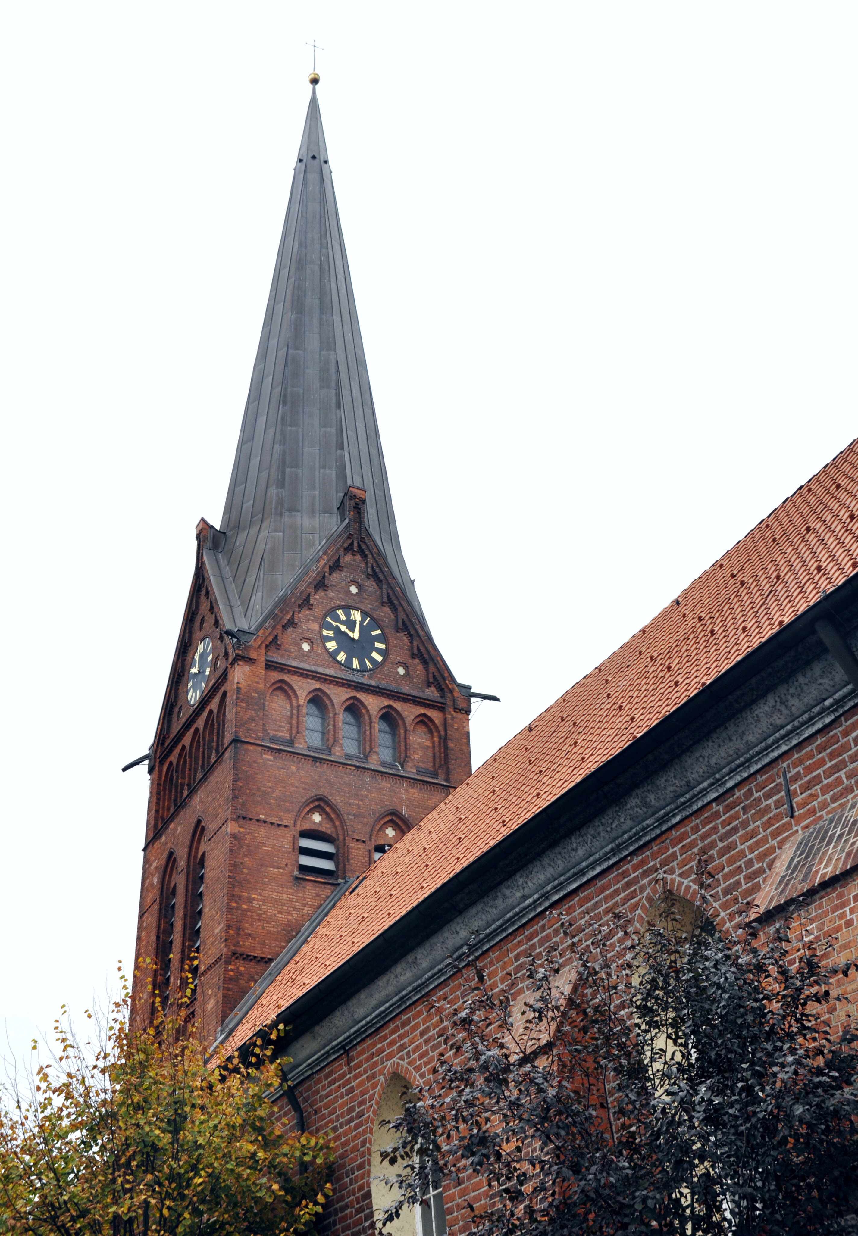 Lauenburg, Maria-Magdalenen-Kirche